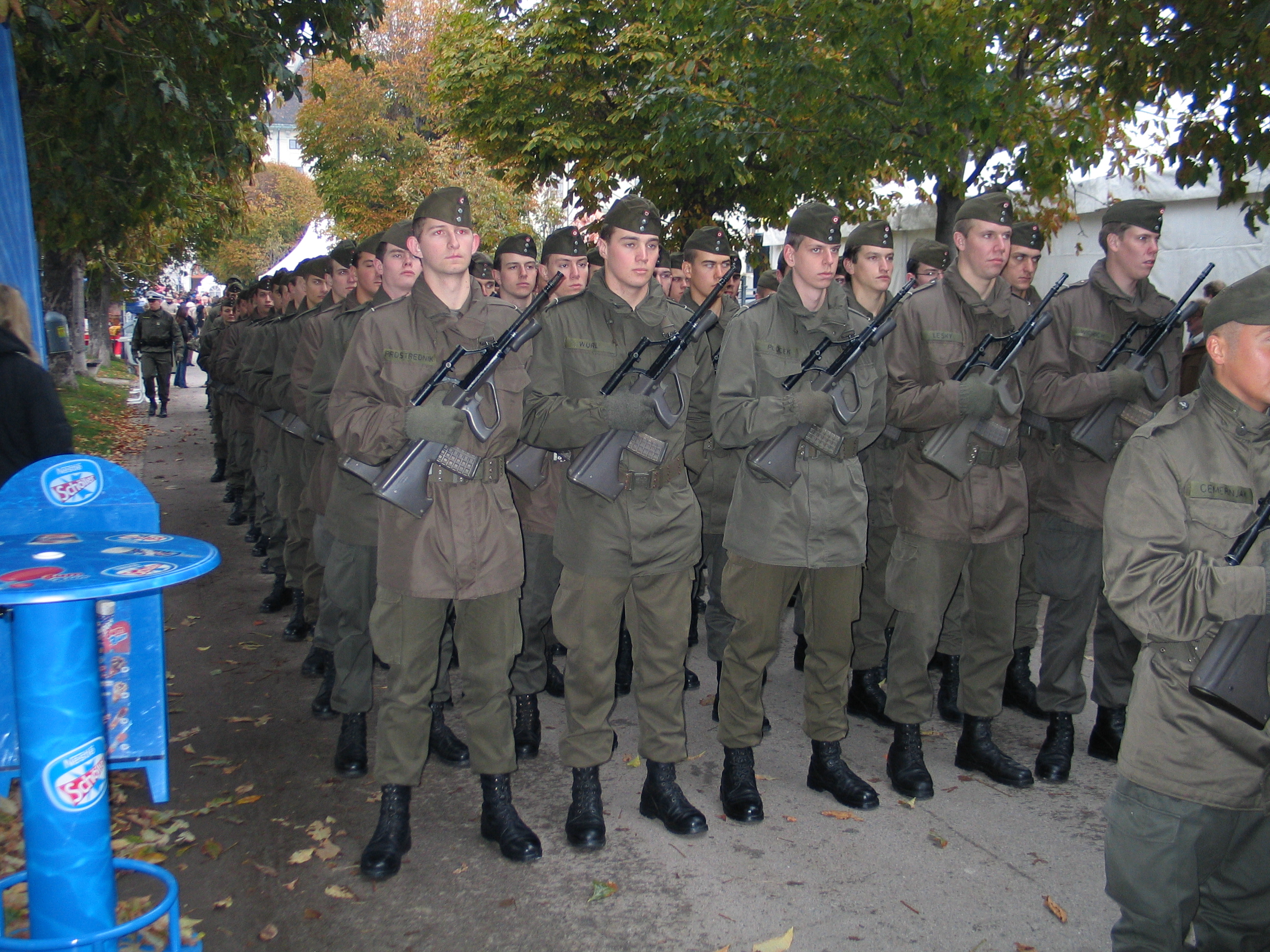 Angelobung